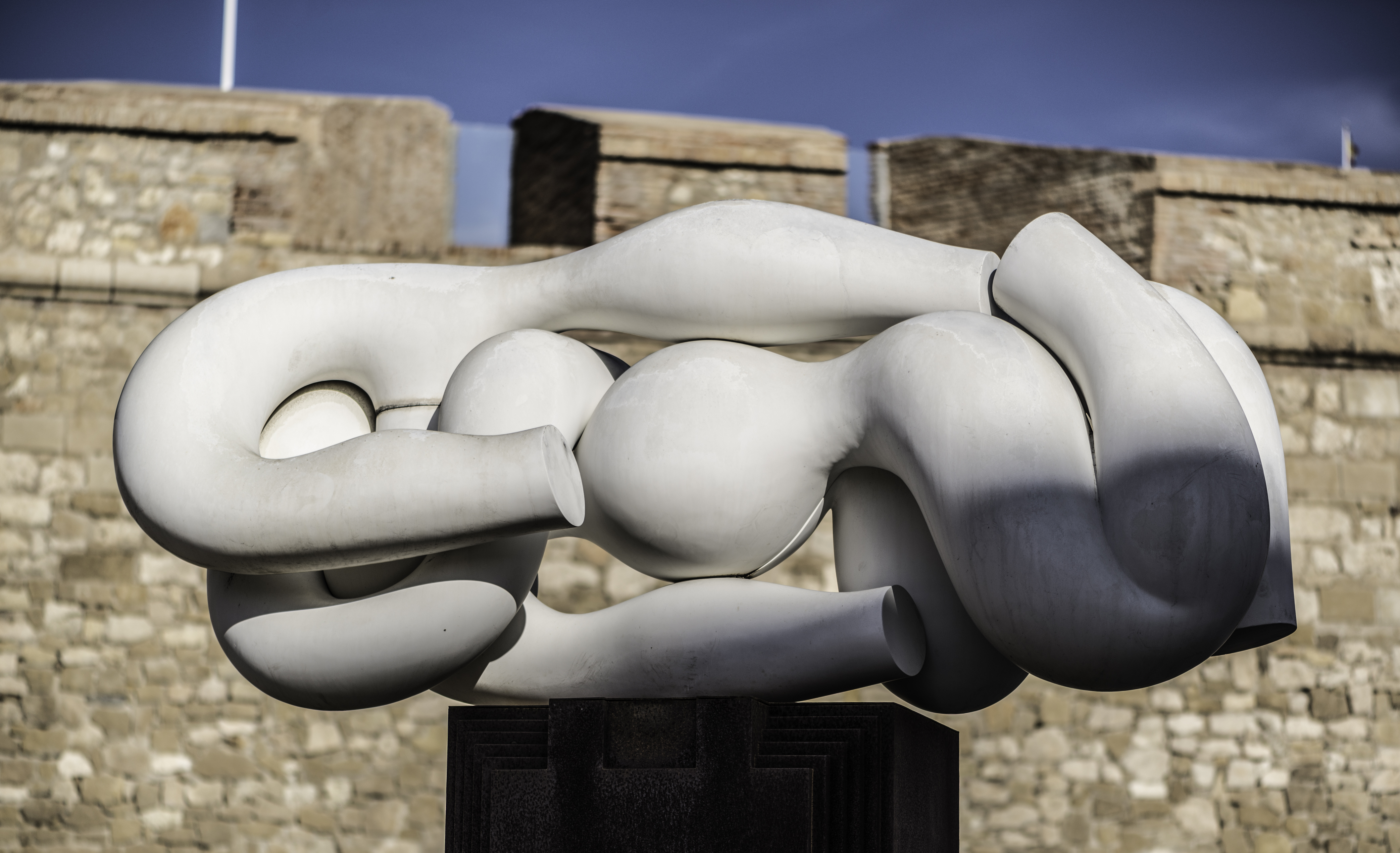 Una de las últimas obras que realizó Miguel Berrocal es Melilla (2004), que guarda una cierta correspondencia con «Algaidas», especialmente relaciones de contenido ya que en esta ciudad ha querido expresar también la amistad, la hermandad, además de la convivencia de culturas en paz.